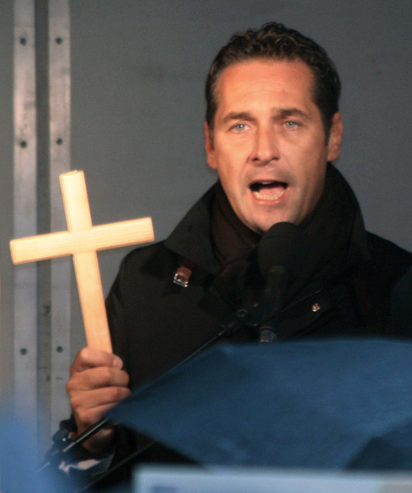 Heinz-Christian Strache (FPÖ) während einer Demonstration gegen den Ausbau eines islamischen Kulturzentrums in Wien-Brigittenau (Friedrich Schmidt-Platz). Beschnitten und digital nachbearbeitet.